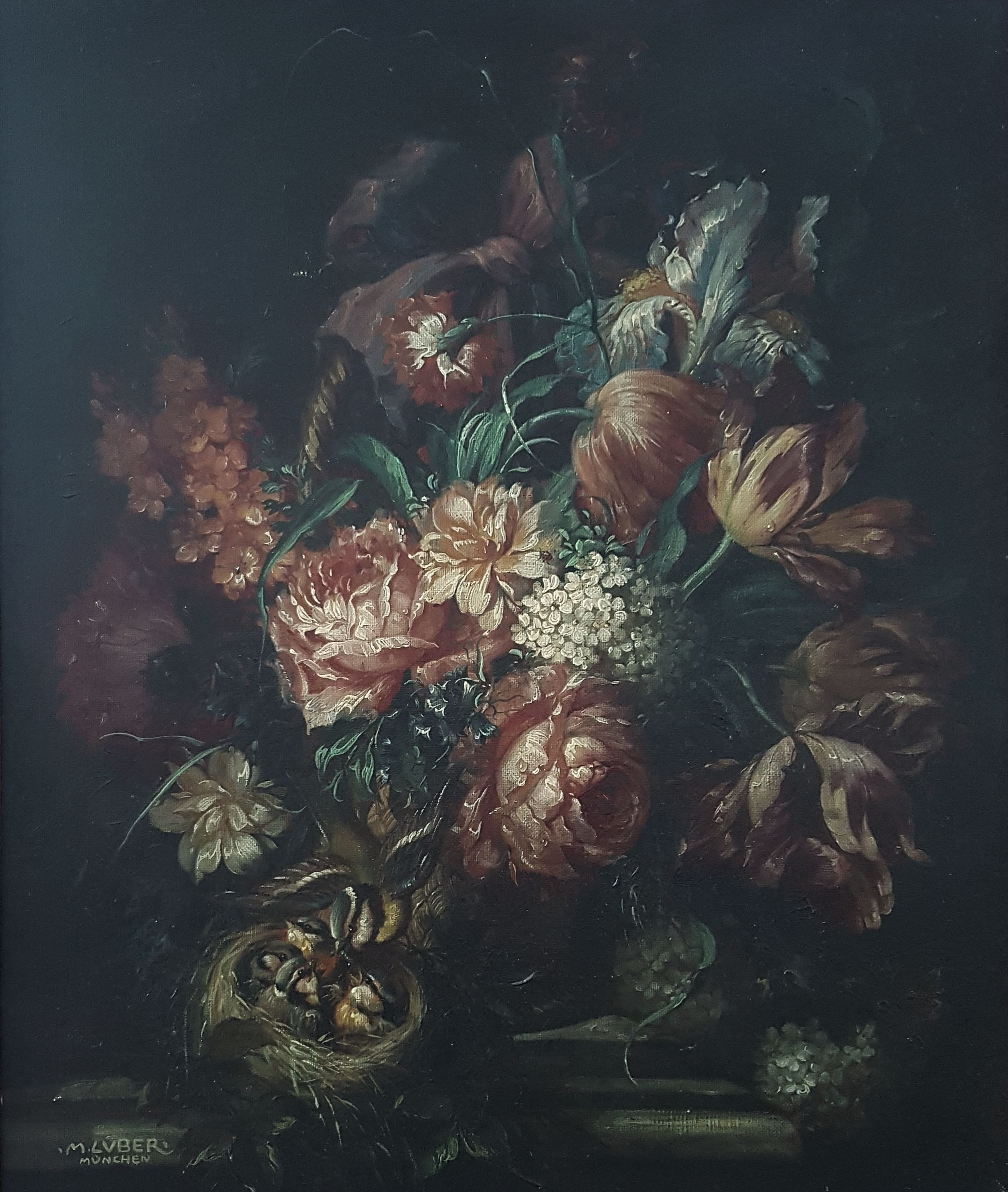 Gemälde Öl auf Leinwand von Max Luber